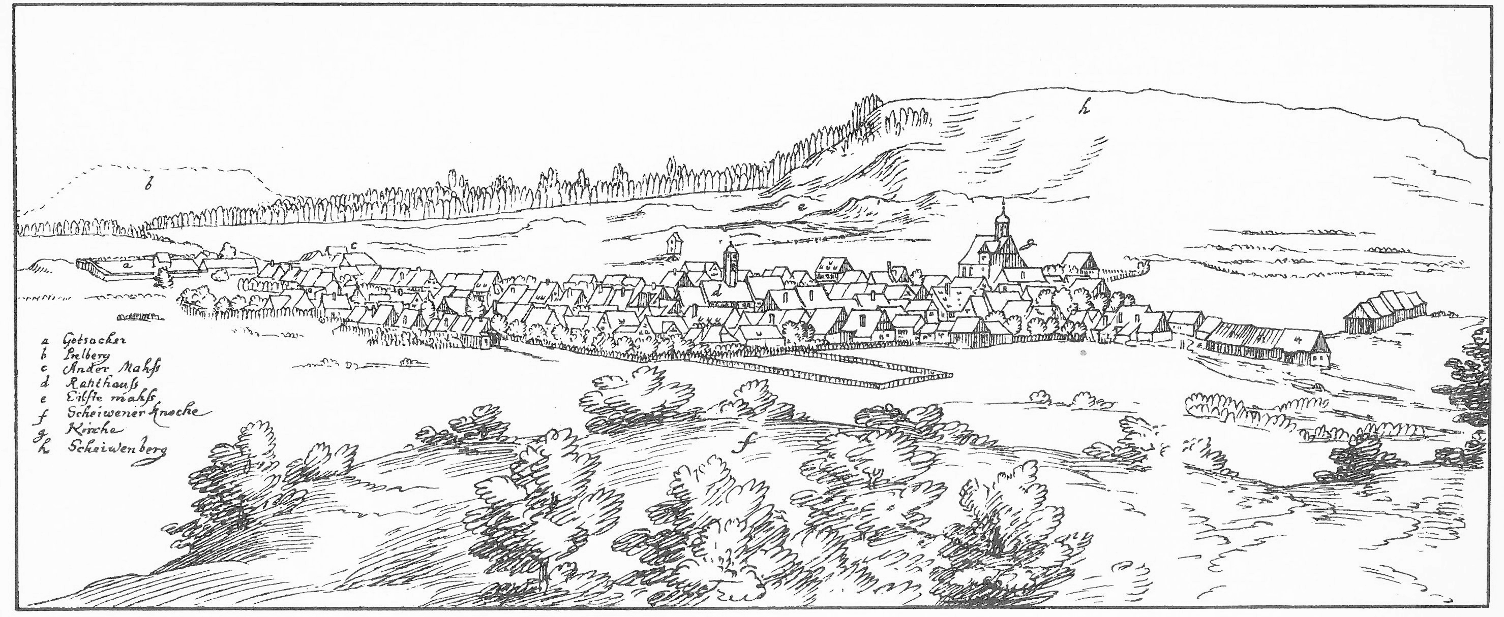 Dilich-Stich von Scheibenberg